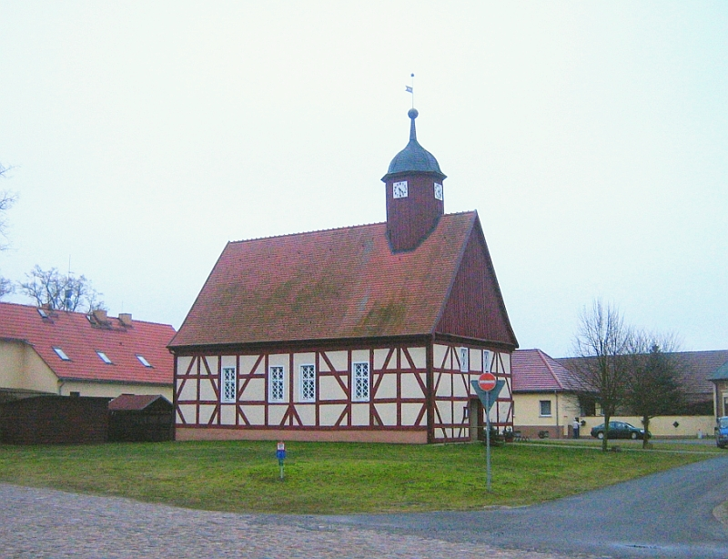 Kirche in Krewelin, einem heute zur Stadt Zehdenick gehörenden Dorf im Landkreis Oberhavel, Brandenburg